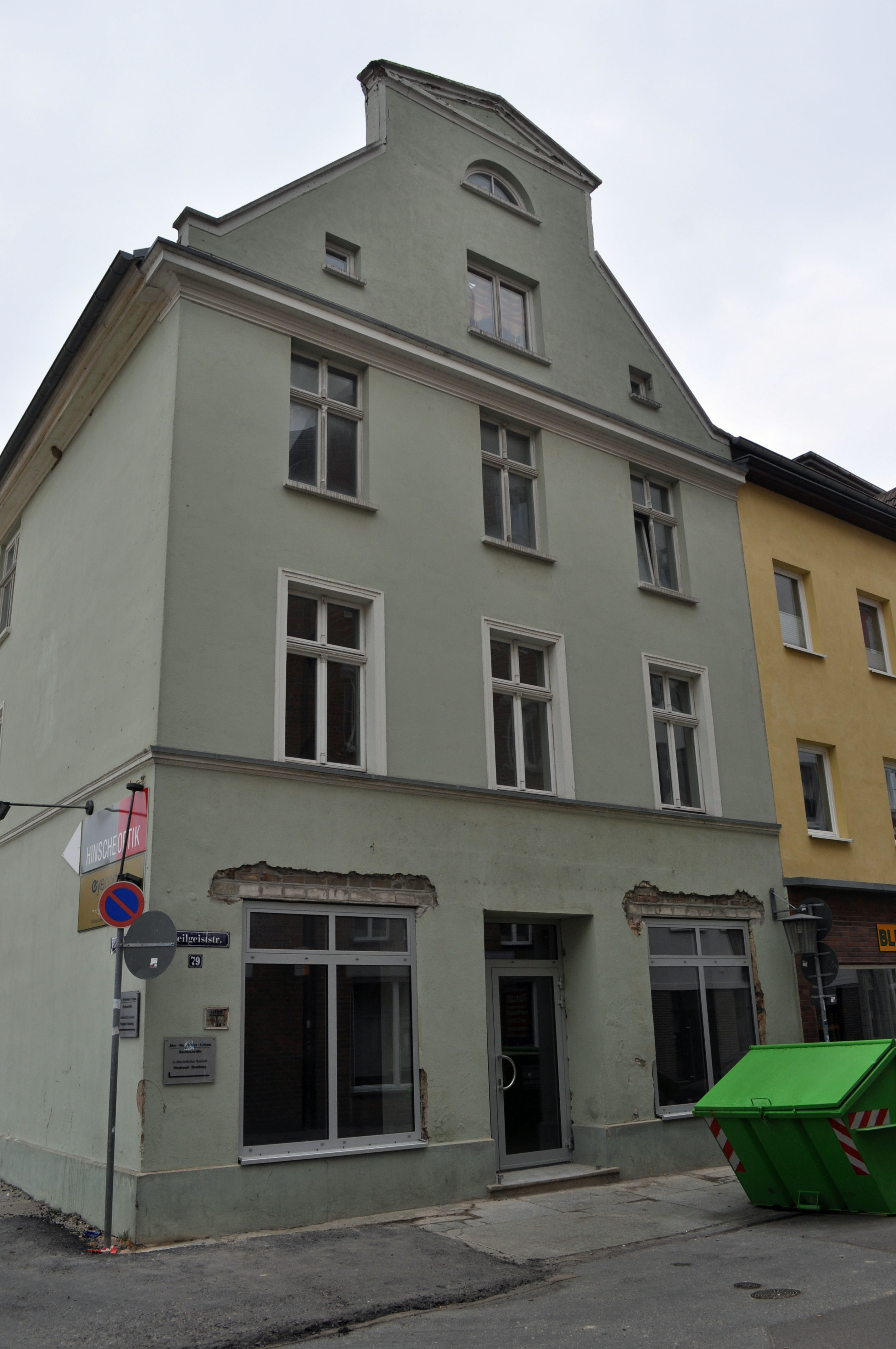 Gebäude bzw. Gebäudedetail in Stralsund. Straße und Hausnummer siehe Dateiname.